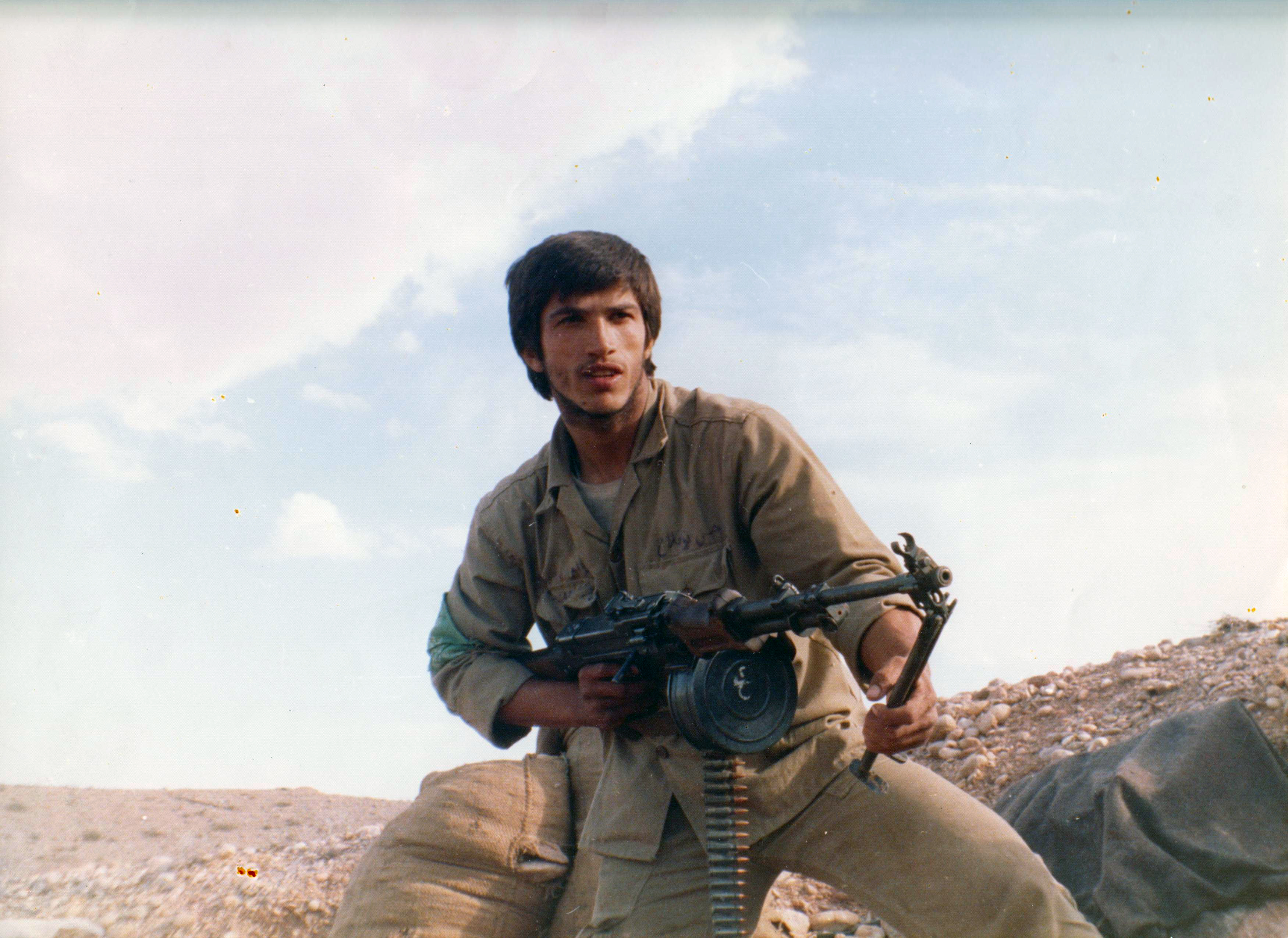 شهید حسن نوفلاح